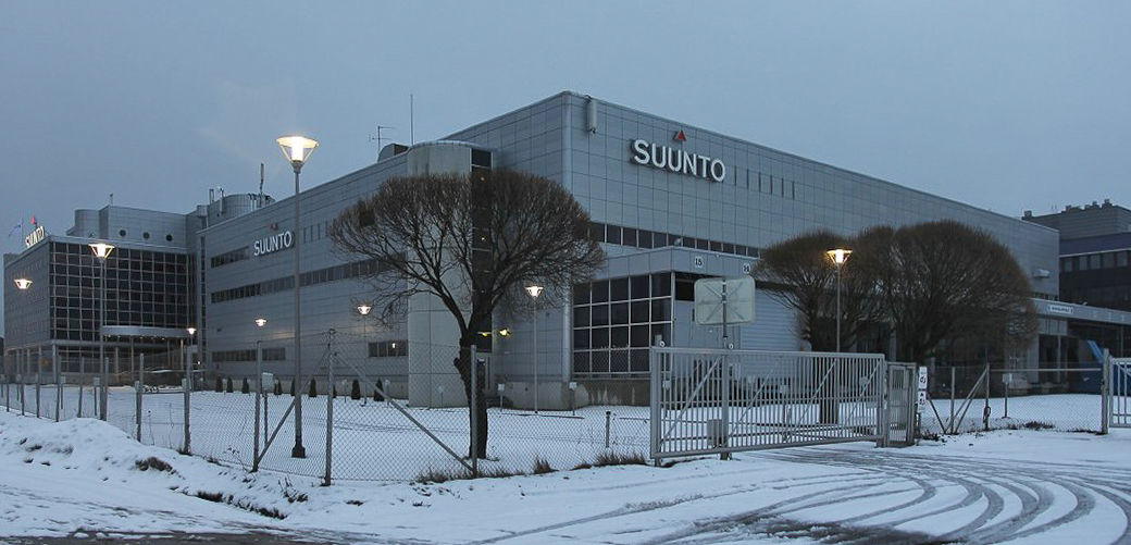 Suunto Oy:n pääkonttori ja tuotantotilat Vantaan Tammistossa. Yhtiö suunnittelee javalmistaa rannetietokoneita, sykemittareita, kompasseja, paikannuslaitteita ja sukellustietokoneita. Vuonna 1936 perustettu Suunto on ollut vuodesta 1999 Amer Sports Oyj:n tytäryhtiö.